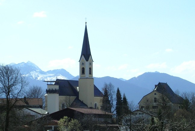 Rohrdorf, Oberbayern